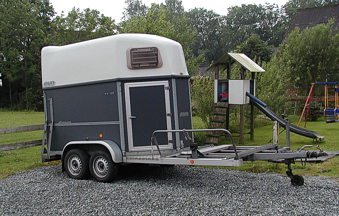 Ein Pferdeanhänger mit Auflieger für eine Kutsche